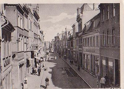 Straße Friedrichstraße (Długa), Bromberg (Bydgoszcz)